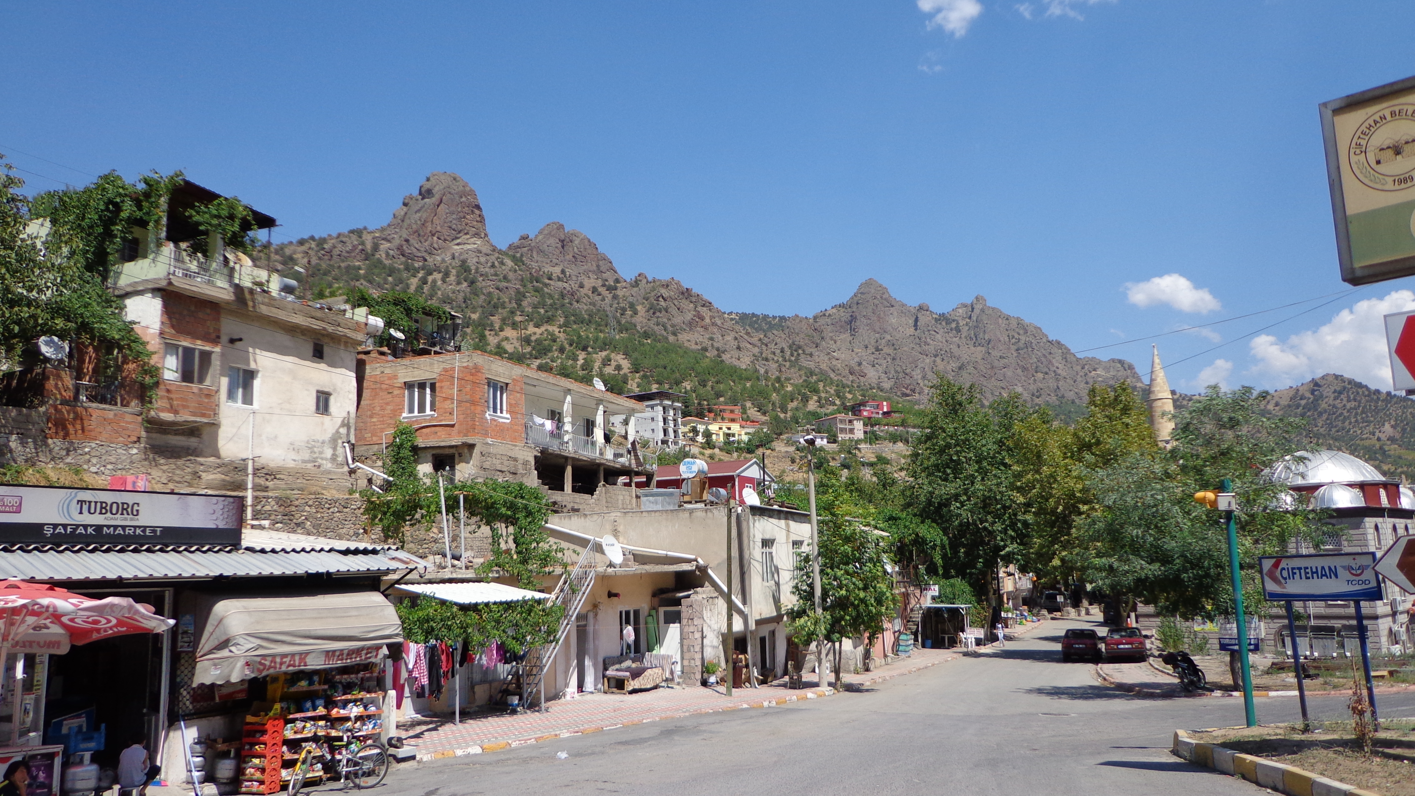 UFUK MERAL